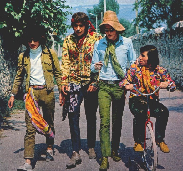 una foto dell'equipe 84 degli anni '60 del XX secolo Licensing Categoria:Immagini di cantanti italiani